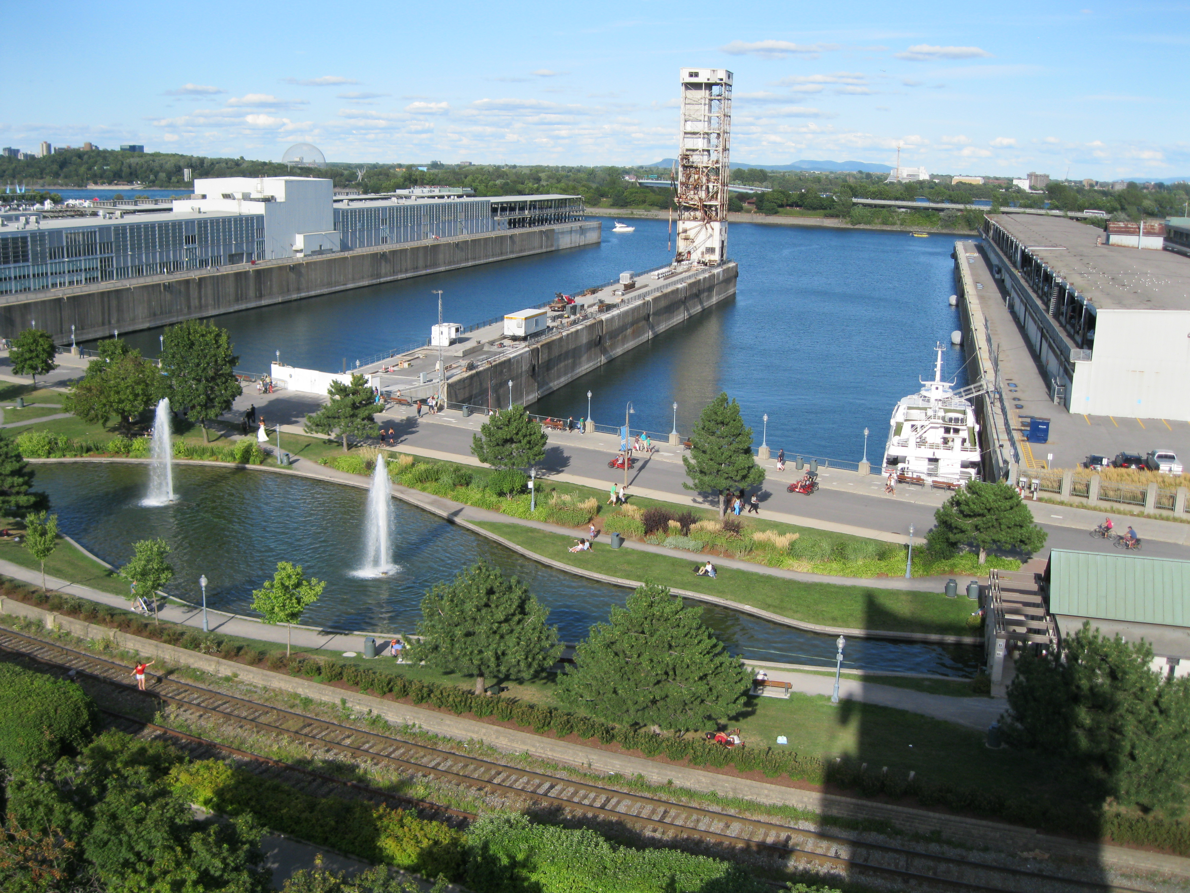 Vues du belvédère de l'Éperon du musée de Pointe-à-Callière, Montréal